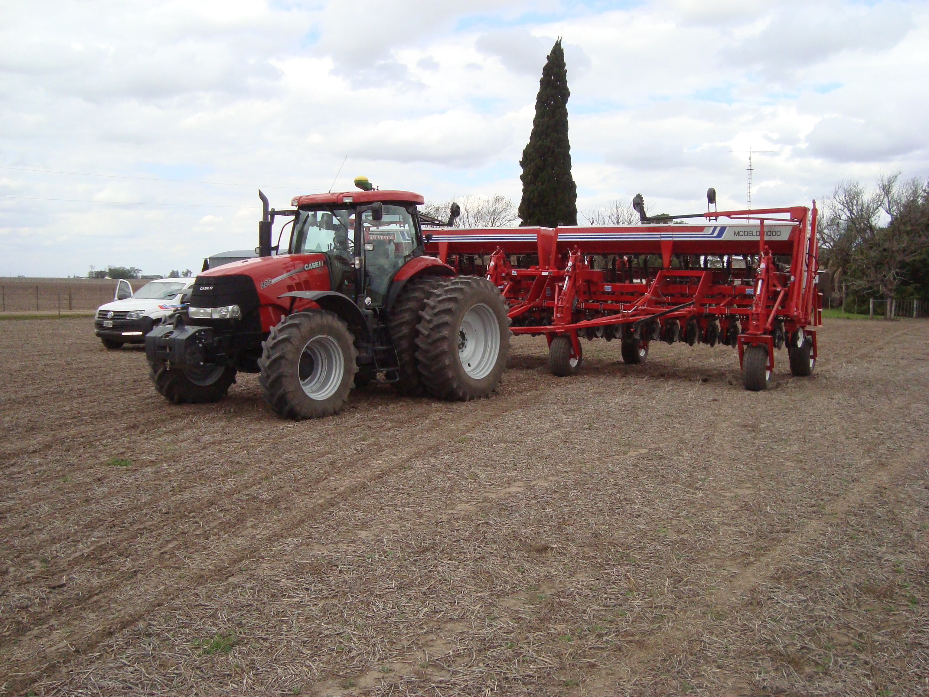 Sembradoras Monumental Campo Hector